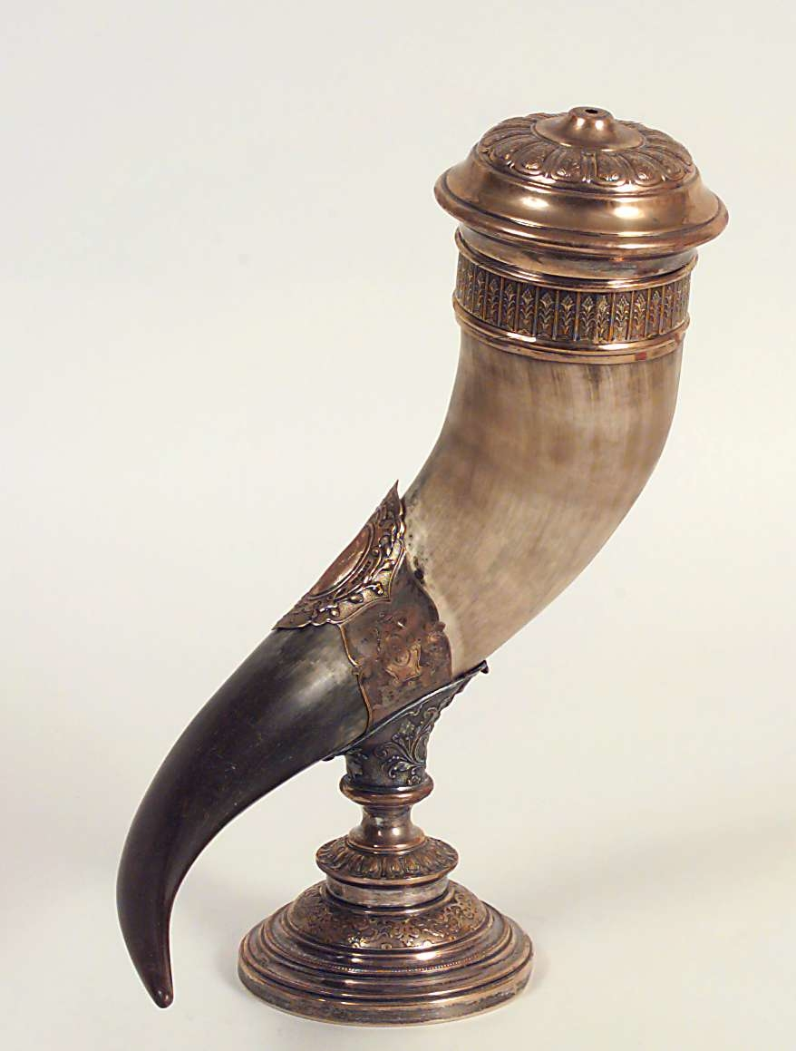 Drikkehorn med innskrift: '30 mai 1884 NPE'. Norsk Folkemuseum, Oslo, NF.1914-0197